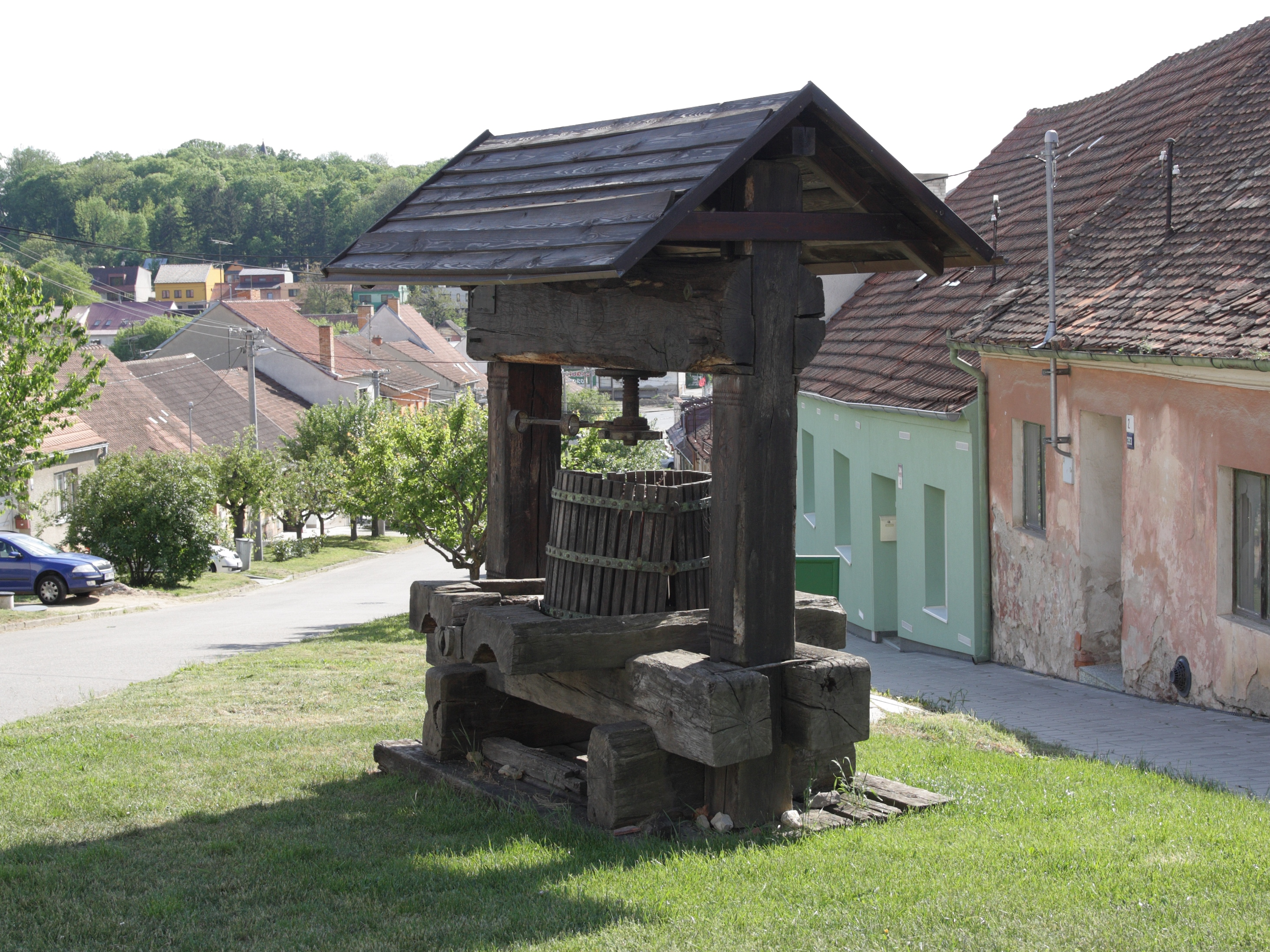 Hustopeče - historický lis na víno, ul. Palackého.